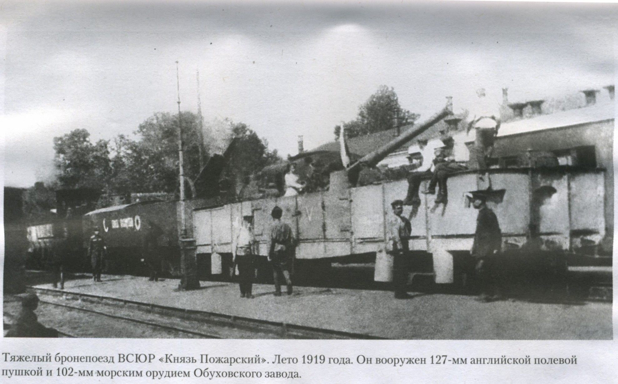 Тяжелый бронепоезд ВСЮР «Князь Пожарский», лето 1919 года.